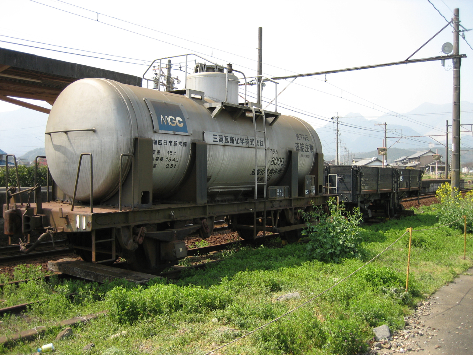 留置されているタム8000、およびト15。三岐鉄道丹生川駅にて撮影。